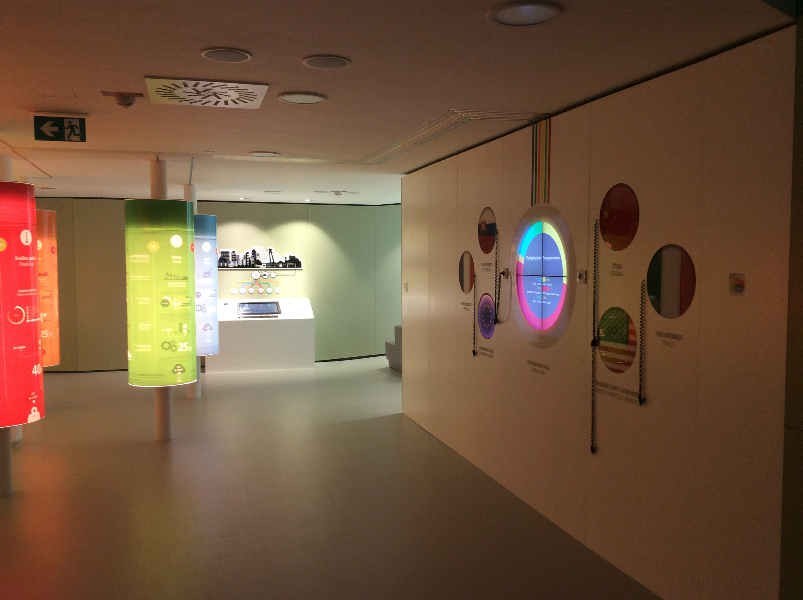 Energetický mix a porovnanie zdrojov výroby elektriny.